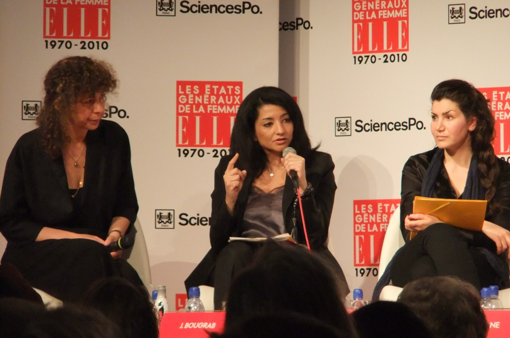 Etats Généraux de la Femme 2010. Quatrième Table Ronde avec Jeannette Bougrab (au centre), présidente de la Halde, Kahina Benziane (à droite), soeur de Sohane, et Valérie Toranian (à gauche), directrice de la rédaction du magazine ELLE. (voir aussi article sur elle.fr